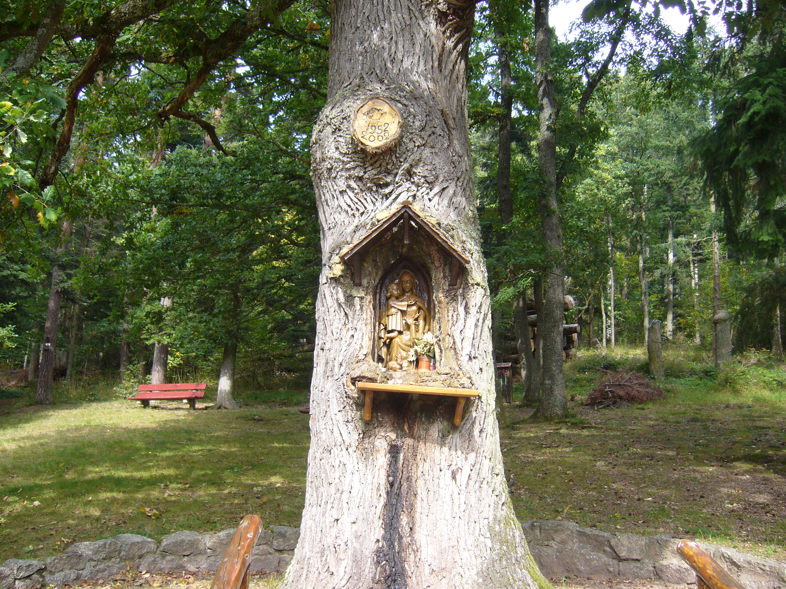 Petit oratoire de Sainte Anne niché dans un arbre à Thannenkirch